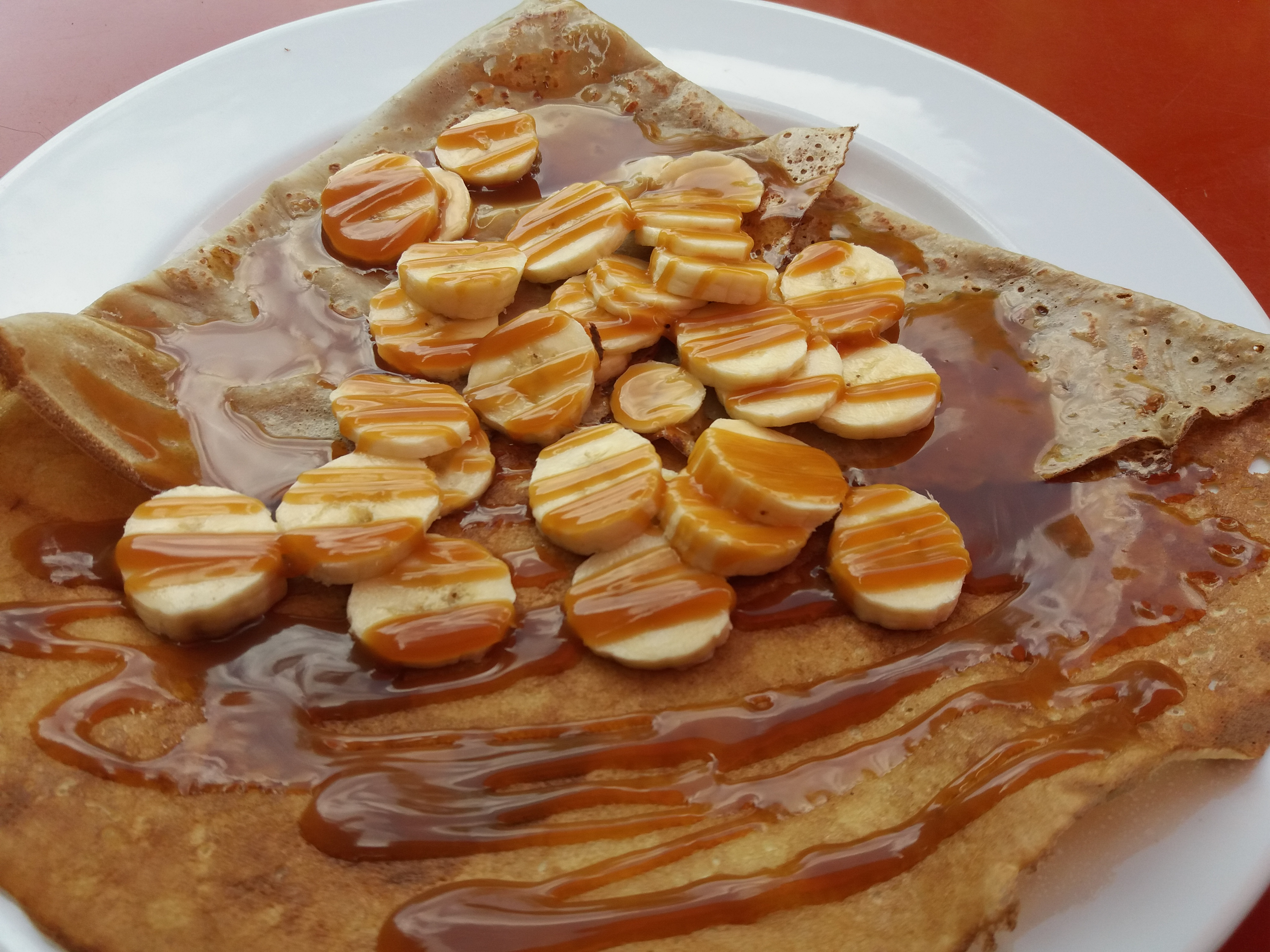 Crêpe banane et caramel au beurre salé de la crêperie Le Moulin du Mont, Mont-Dol (Ille-et-Vilaine, France)